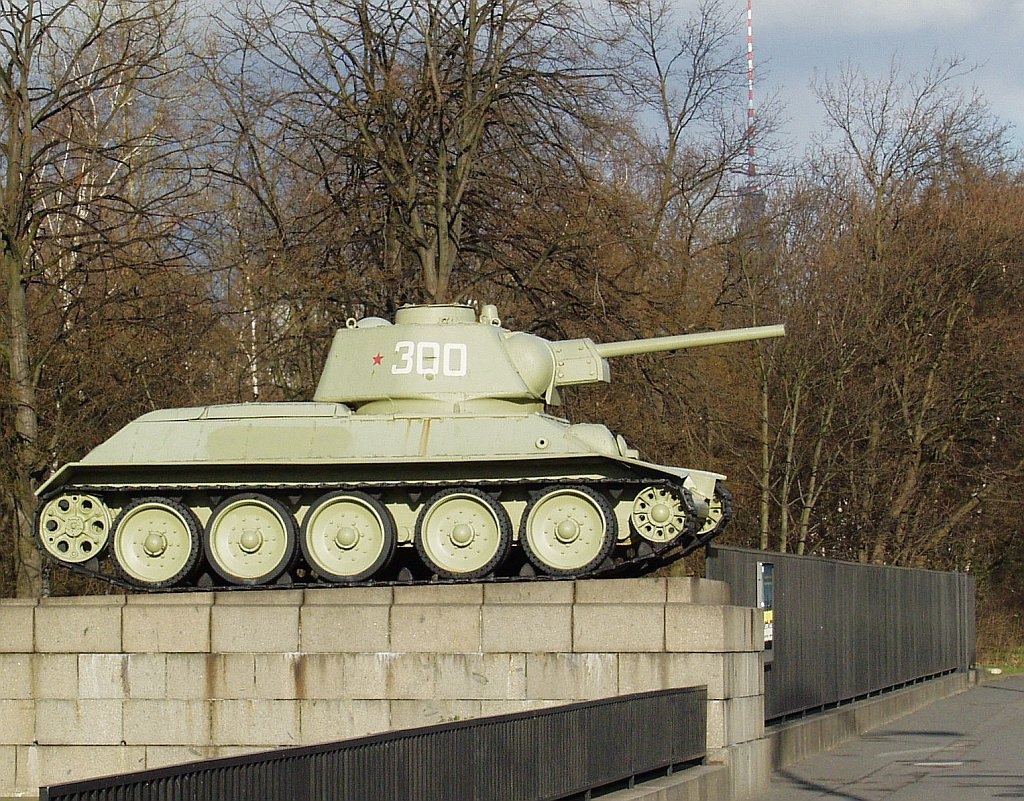 Berlin - Tiergarten -Sowjetisches Ehrenmal (Berlin- Mitte ) - Panzer T-34/76